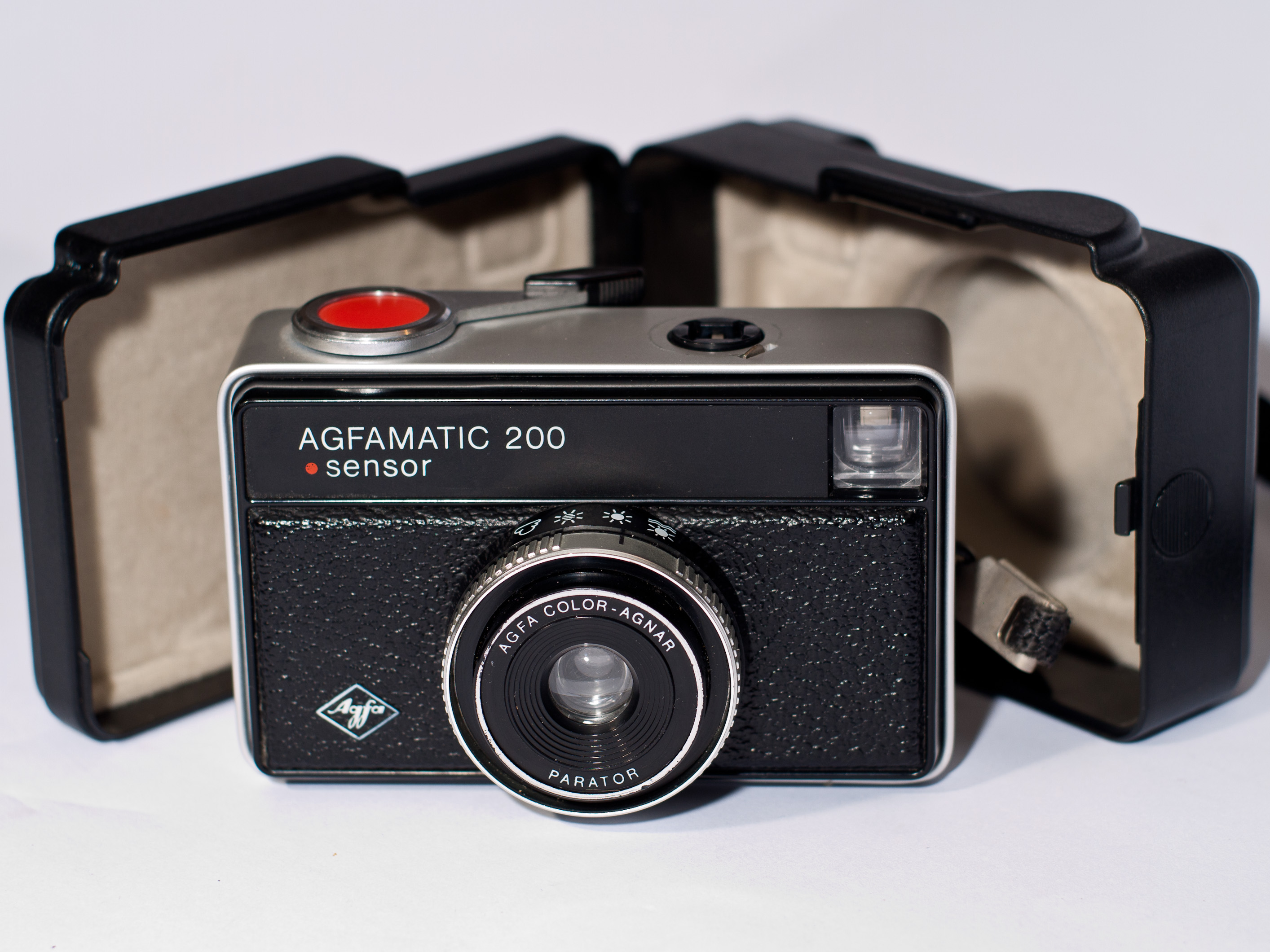 Agfamatic 200 sensor plus hardcase